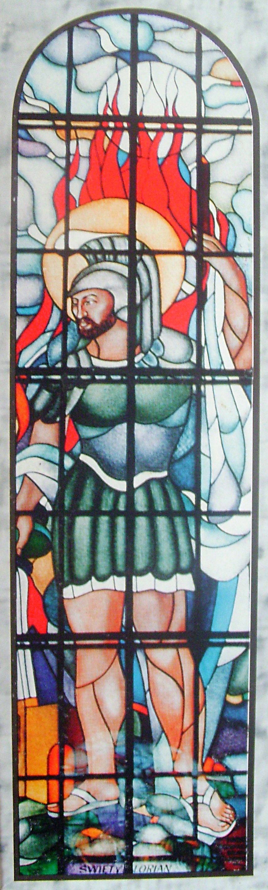 św. Florian - witraż w kościele Imienia Maryi w Bączalu Dolnym (diecezja rzeszowska)